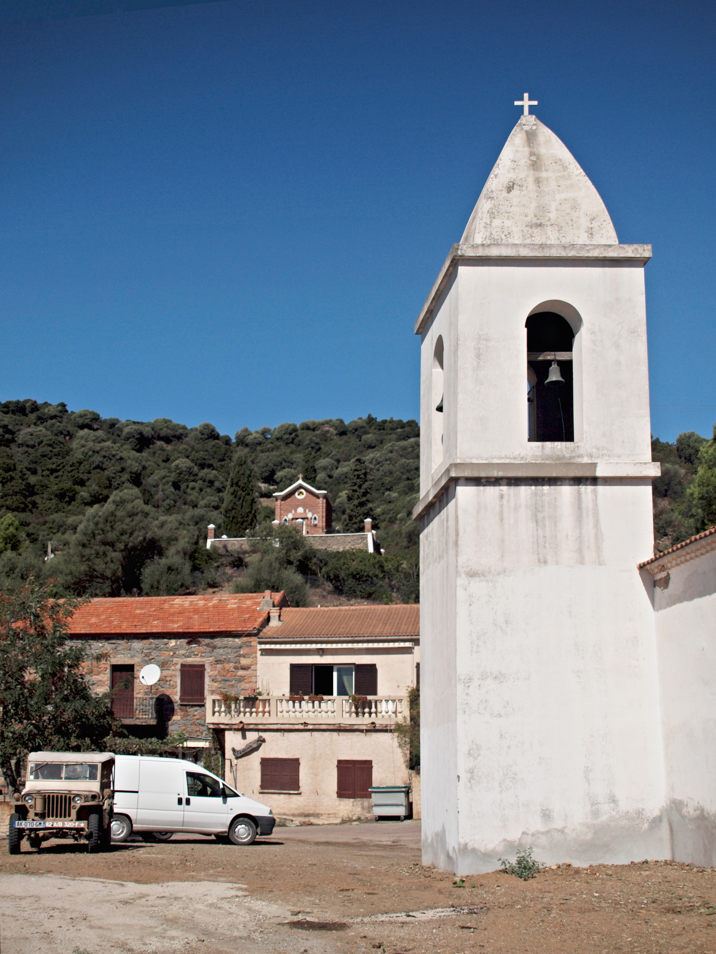 Osani (Corsica) - Clocher de l'église paroissiale Saint-François. A l'arrière-plan, la tombe du jardinier Lorenzo, la plus belle du cimetière, érigée par les villageois.